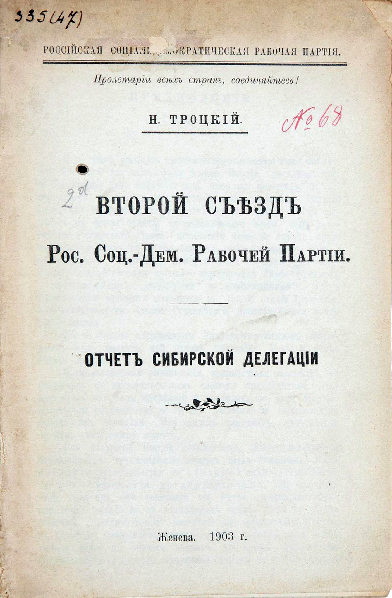 Троцкий, Л.Д. Второй съезд Рос. соц.-дем. рабочей партии. Отчет Сибирской делегации / Н. Троцкий. Женева: Российская социалдемократическая рабочей партия, 1903. 36 с.